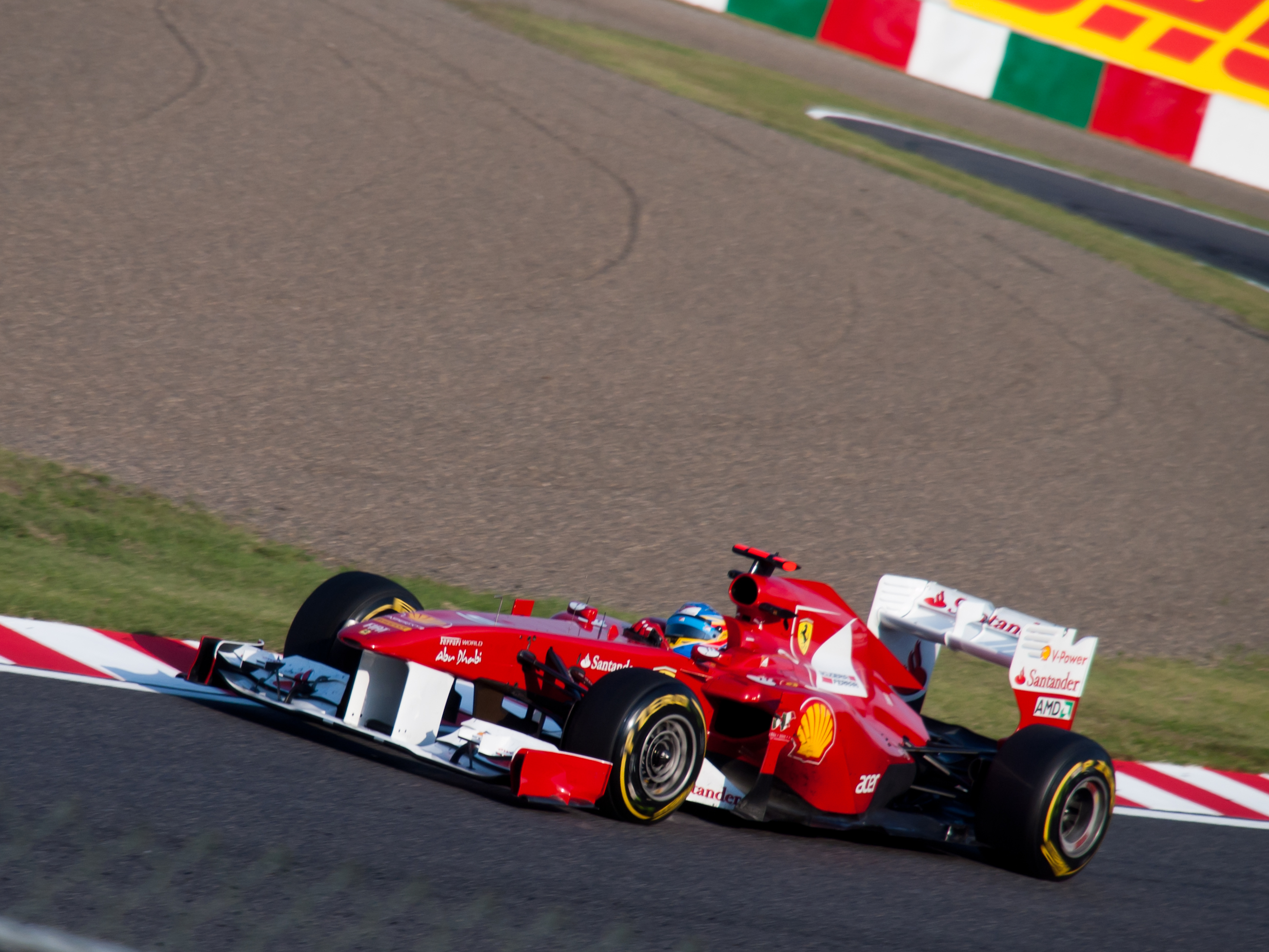 Fernando Alonso lors du Grand Prix du Japon 2011 sur Ferrari F150° Italia.